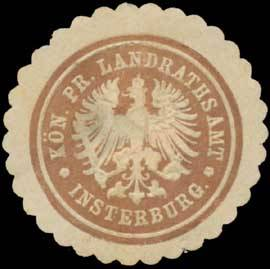 Sealing stamp Title: K.Pr. Landrathsamt Insterburg Description: braun, weiß, geprägt Place: Insterburg size: 3 cm